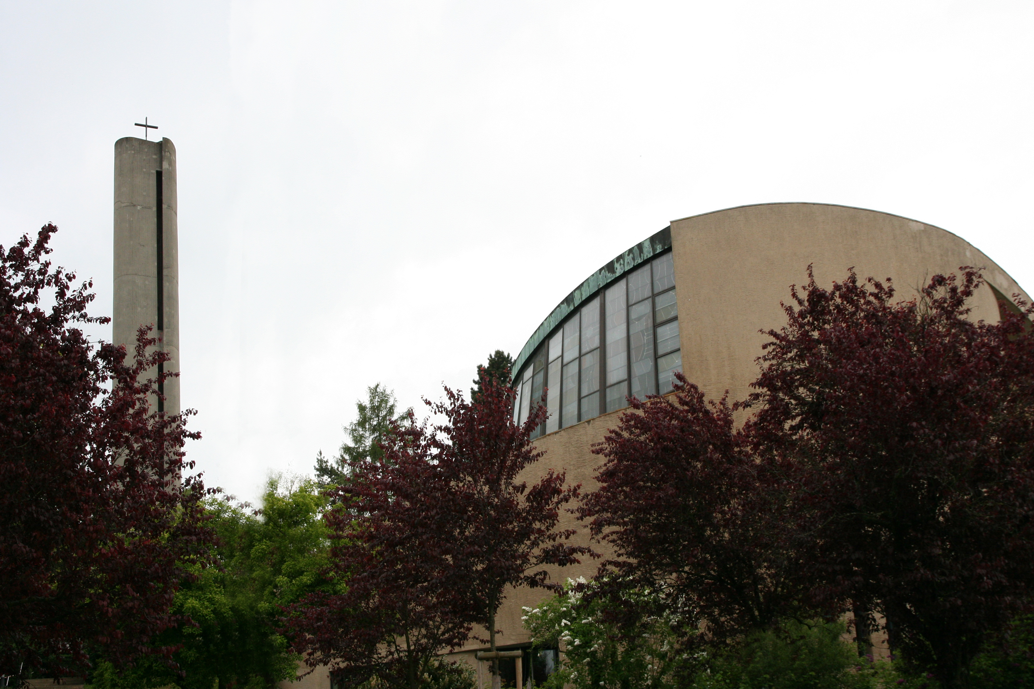 Römisch-katholische Kirche Bruder KIaus Basel, Ansicht von Norden